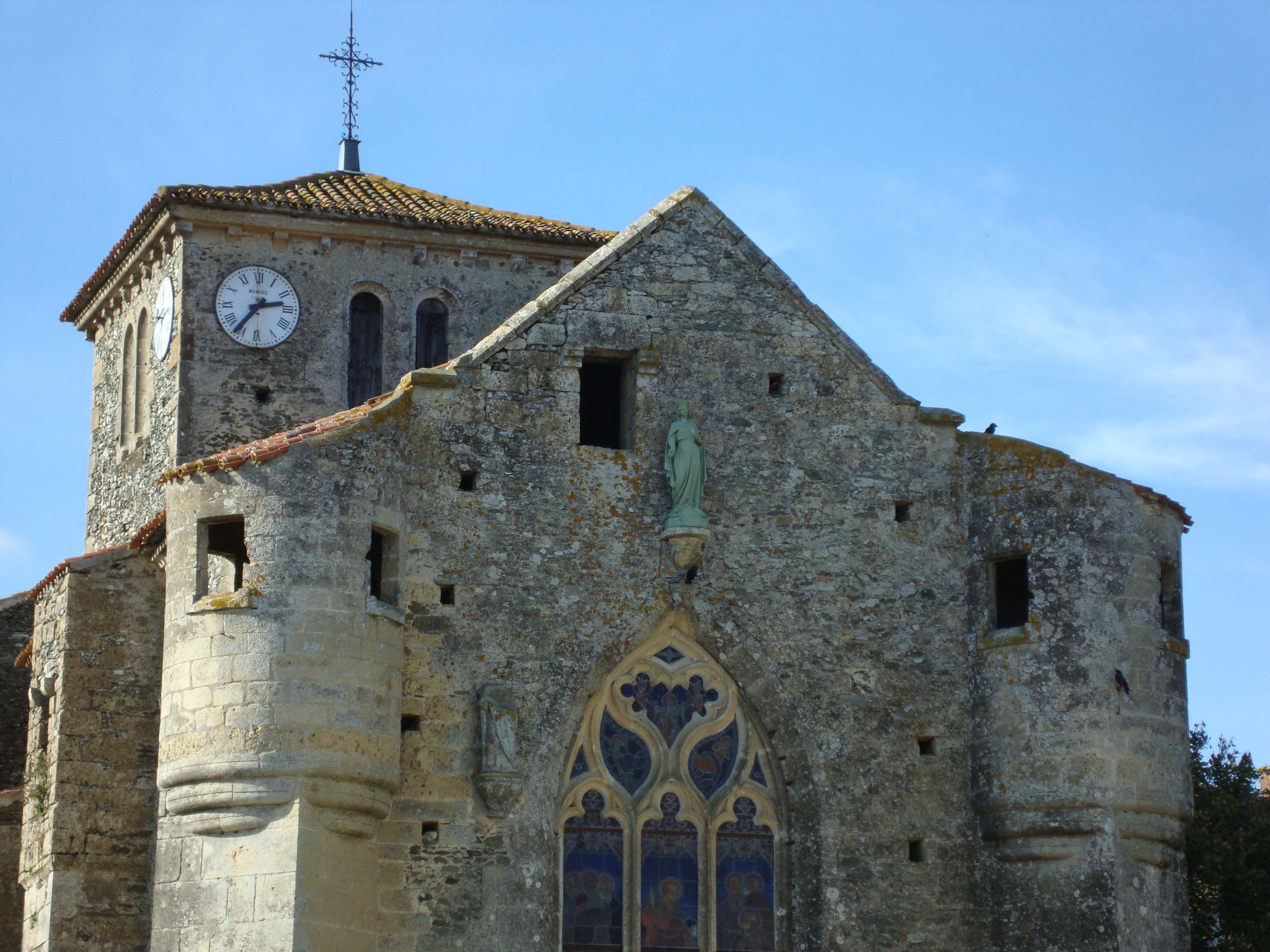 Église Notre-Dame de Réaumur, (Inscrit, 1927) .